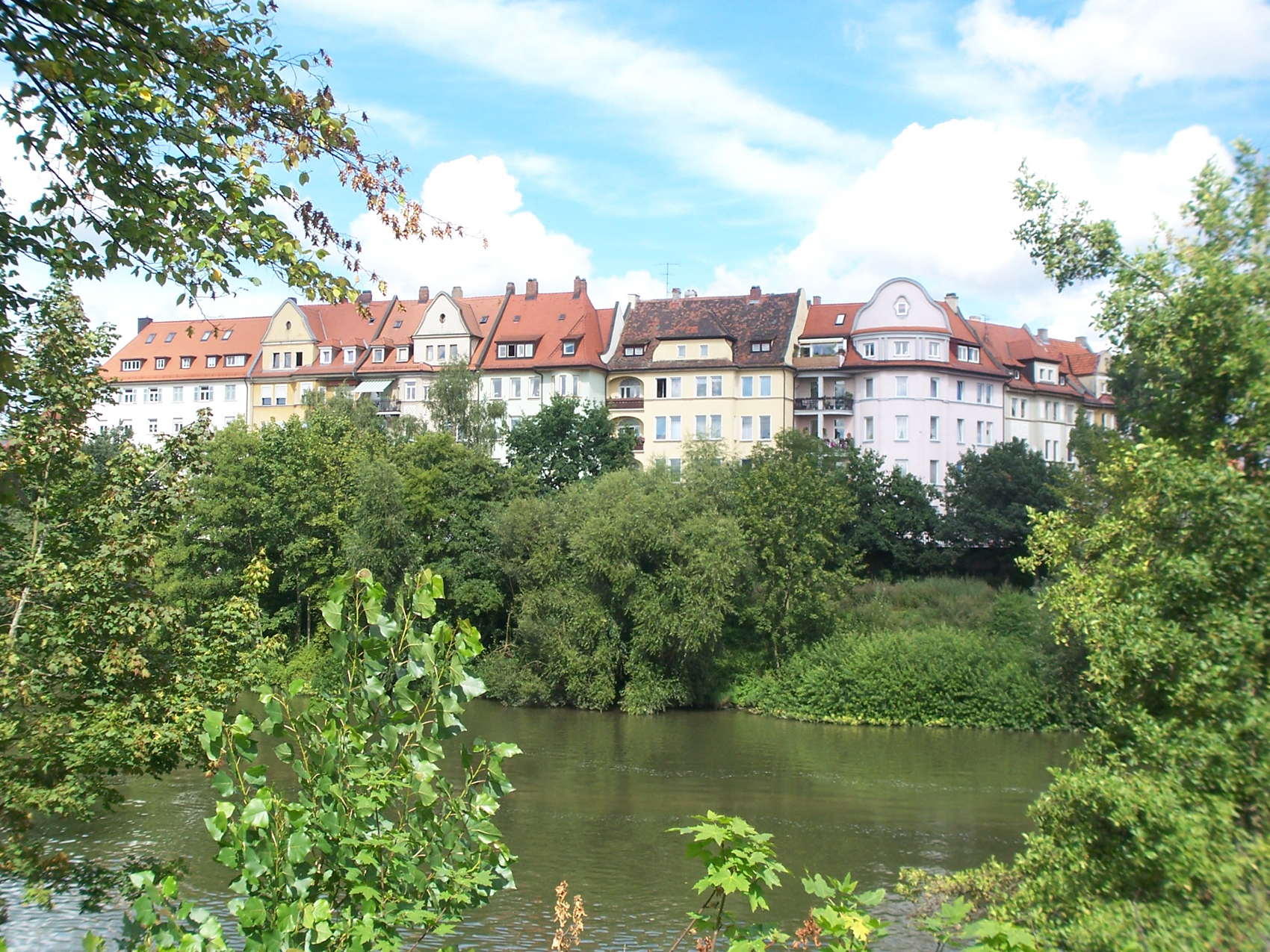 Blick auf den Kunigundendamm vom gegenüberliegenden Heinrichsdamm aus.